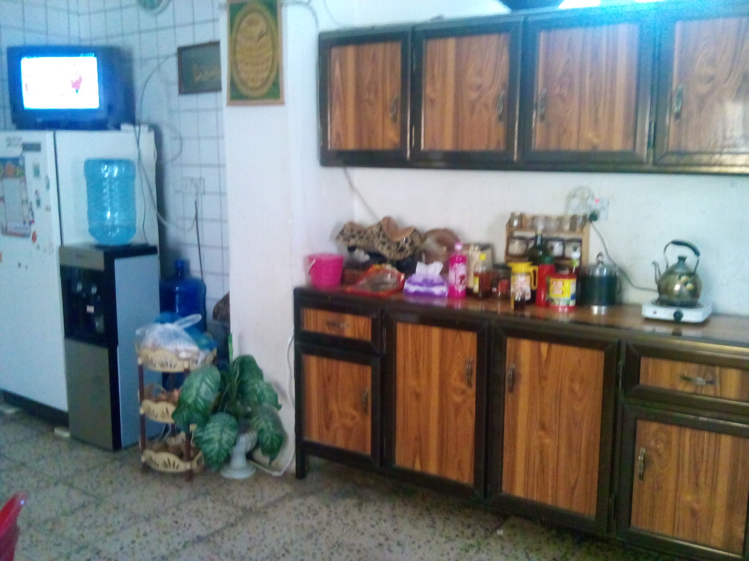 غرفة مطبخ في بغداد